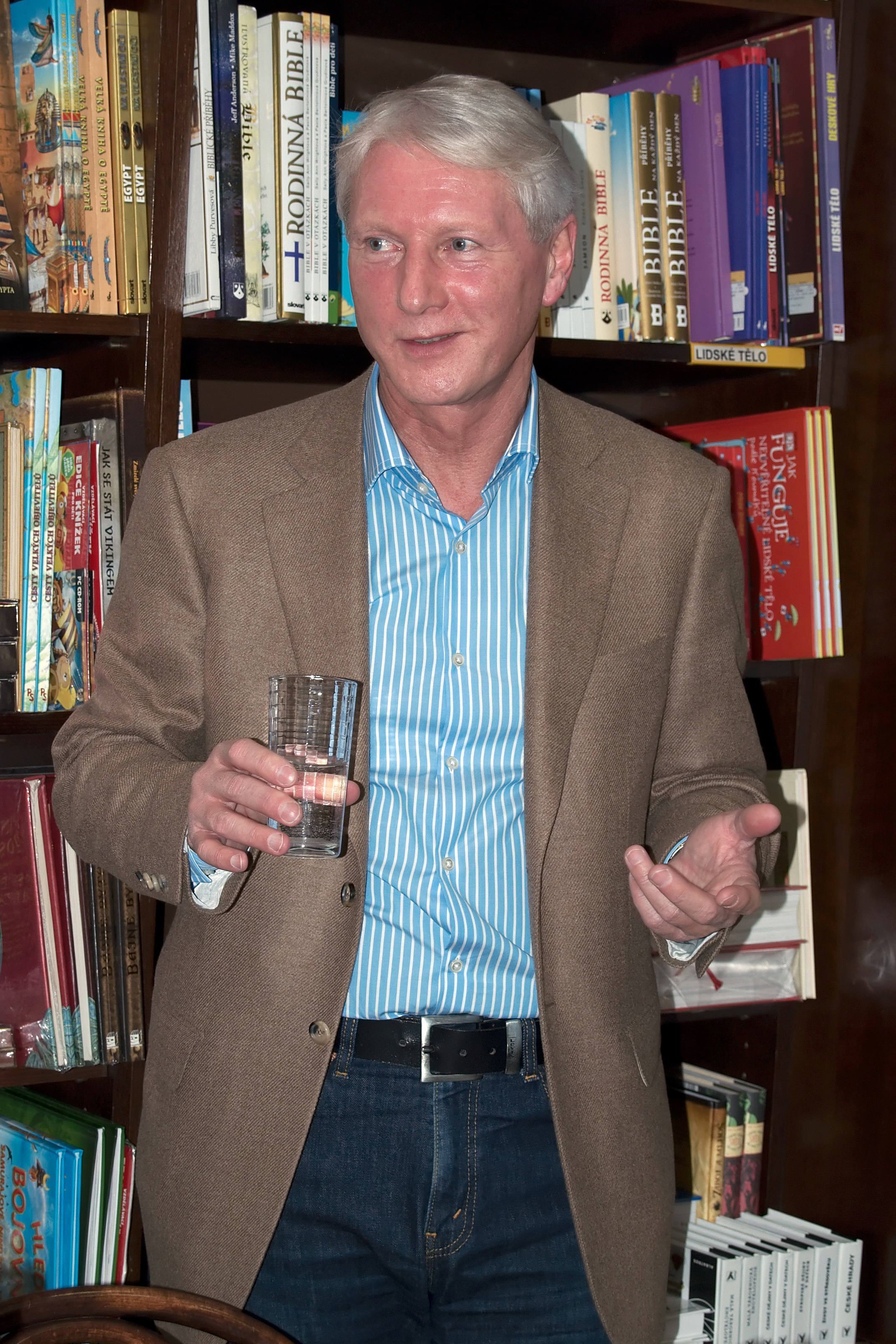 Ladislav Špaček na autogramiádě dne 18. března 2010 v brněnském knihkupectví Barvič a Novotný